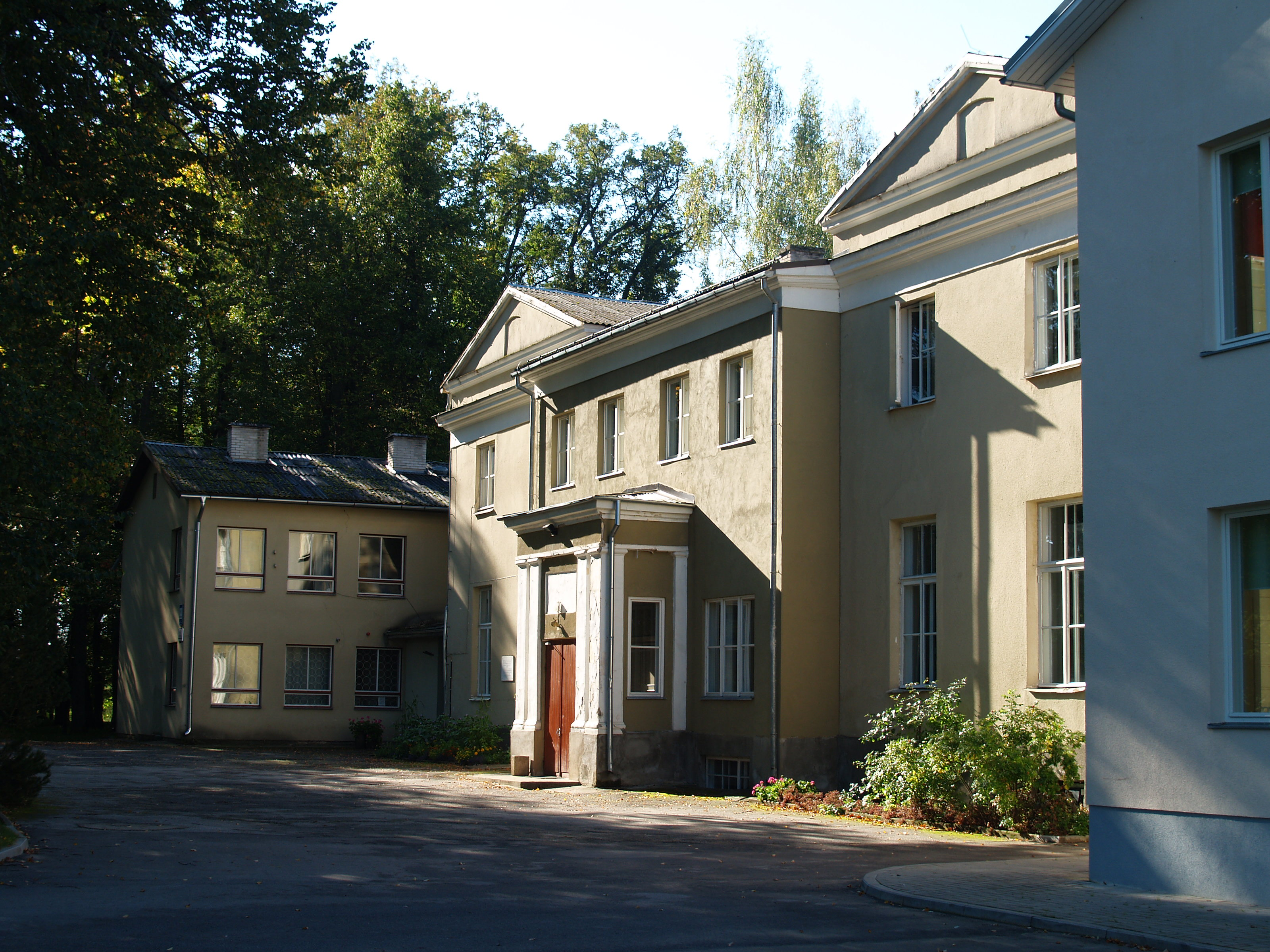 Vana-Kuuste mõis